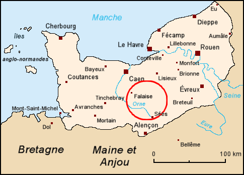 Carte de la Normandie médiévale et localisation du Hiémois